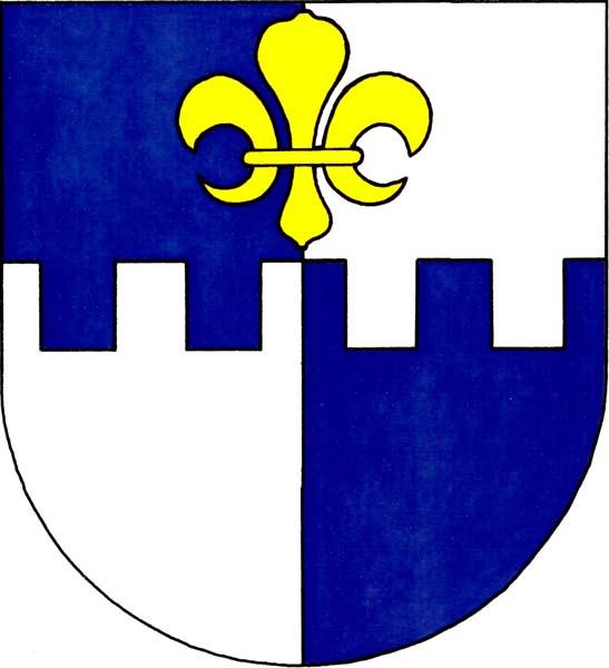 Znak obce Staňkovice